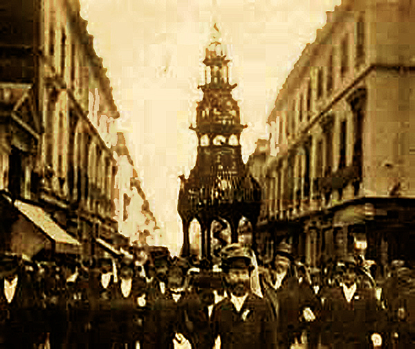 Compagnons charpentiers de Tours, en 1911, défilant avec chef d'oeuvre pour la saint Joseph